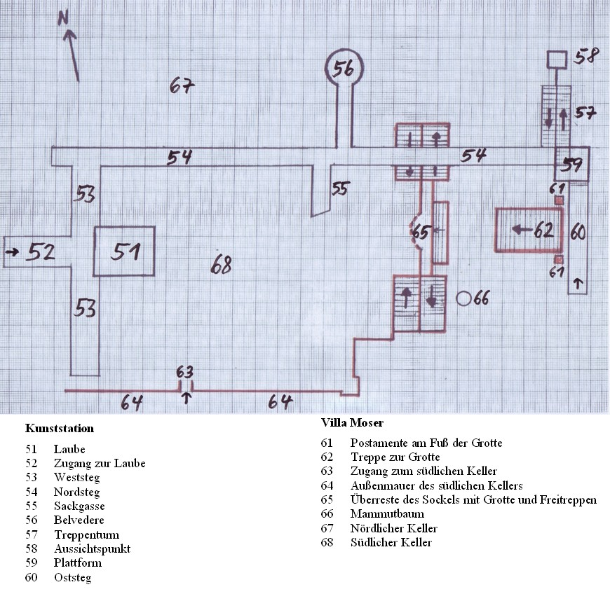 Kunststation Villa Moser, Stuttgart, Lageplan.